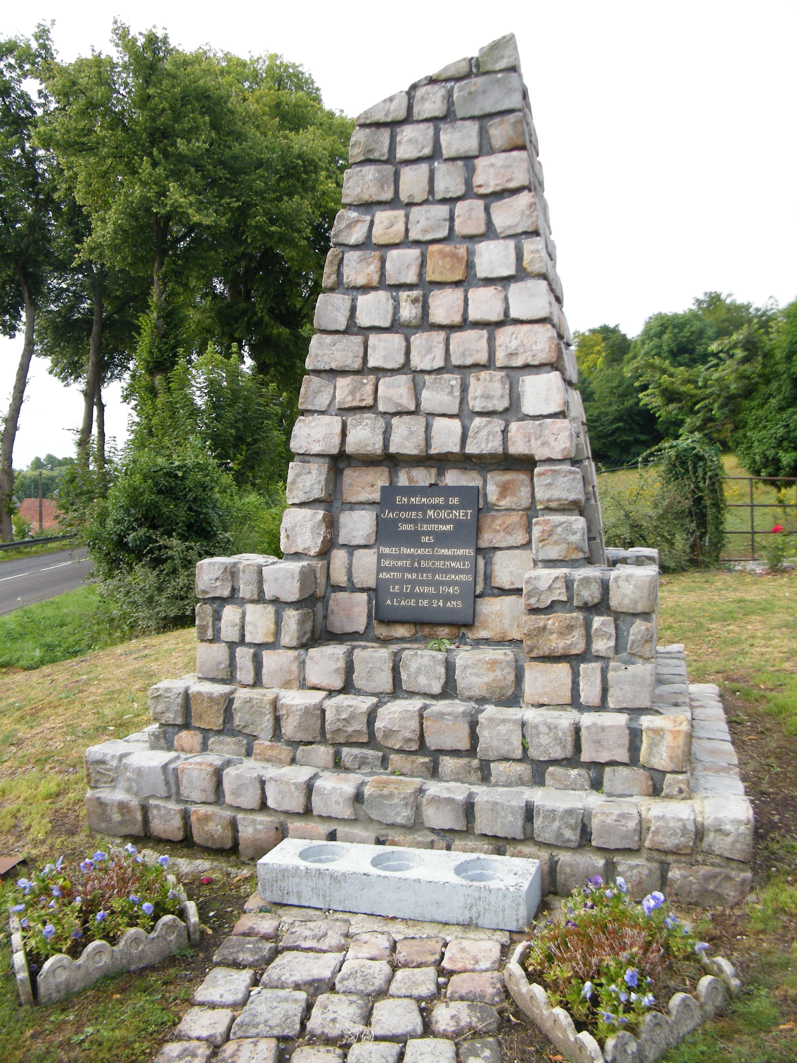 Monument Jacques Moignet, résistant abattu par les allemands en 1945, situé face à l'église Saint-Jean de Caubert, Mareuil-Caubert, Somme, France.